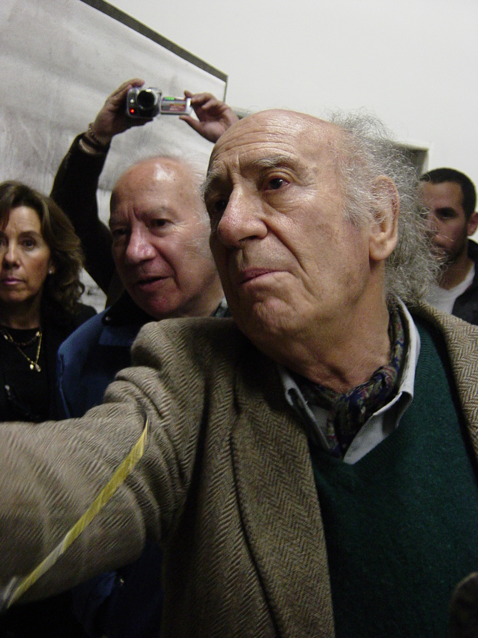 El pintor catalán José Balmes. 2007.